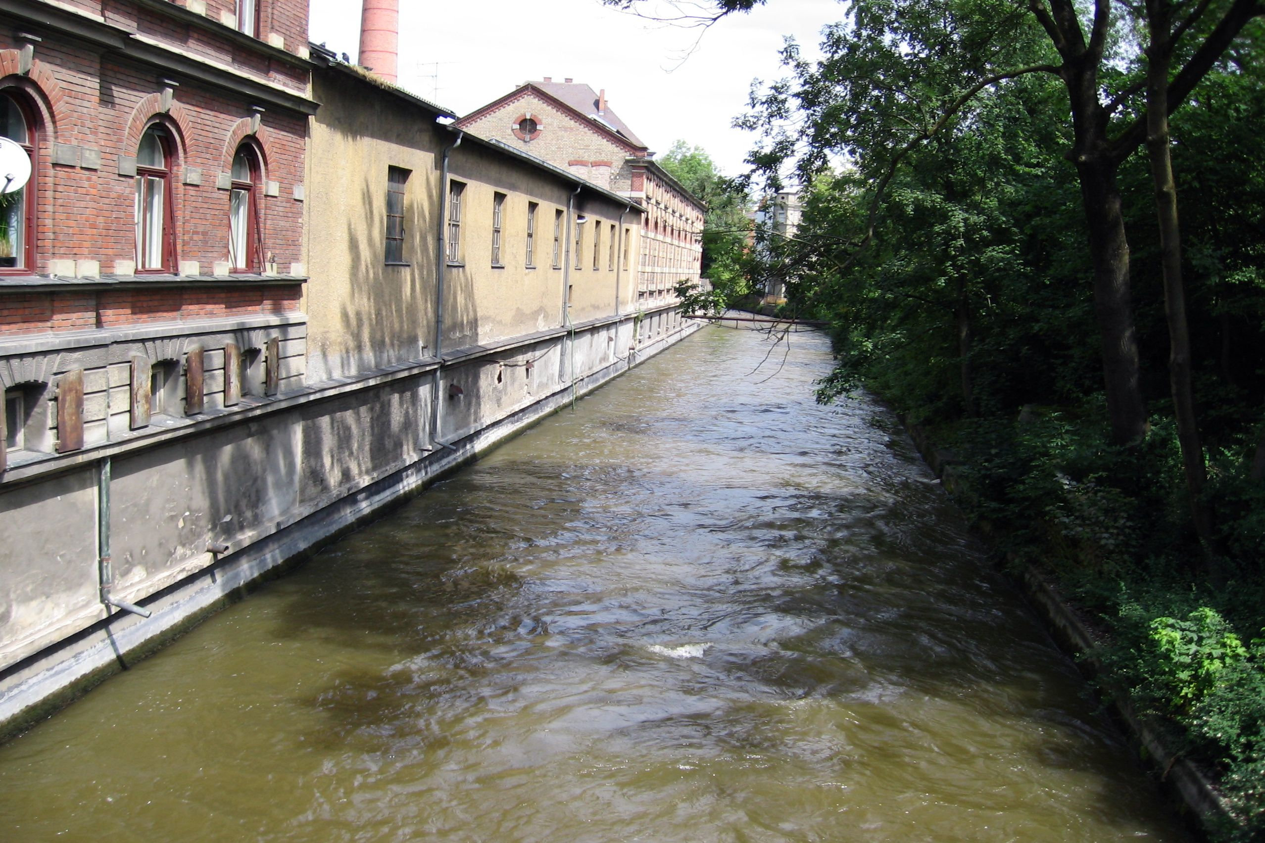 Der Kanal Senkelbach in Augsburg, nördlich der Wertachstraße.